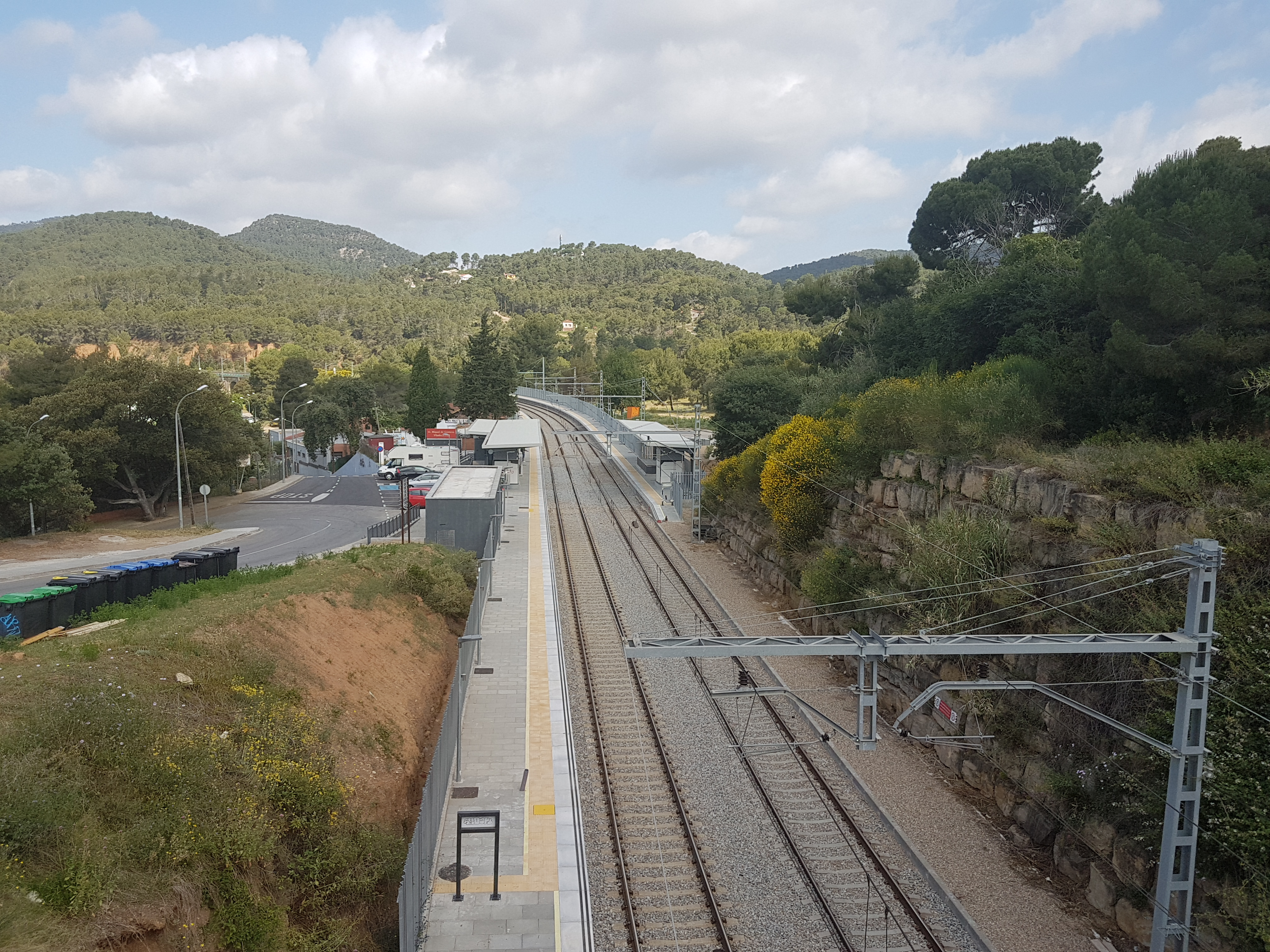 Estació de Sant Miquel de Gonteres-Viladecavalls de la línia Barcelona-Manresa-Lleida